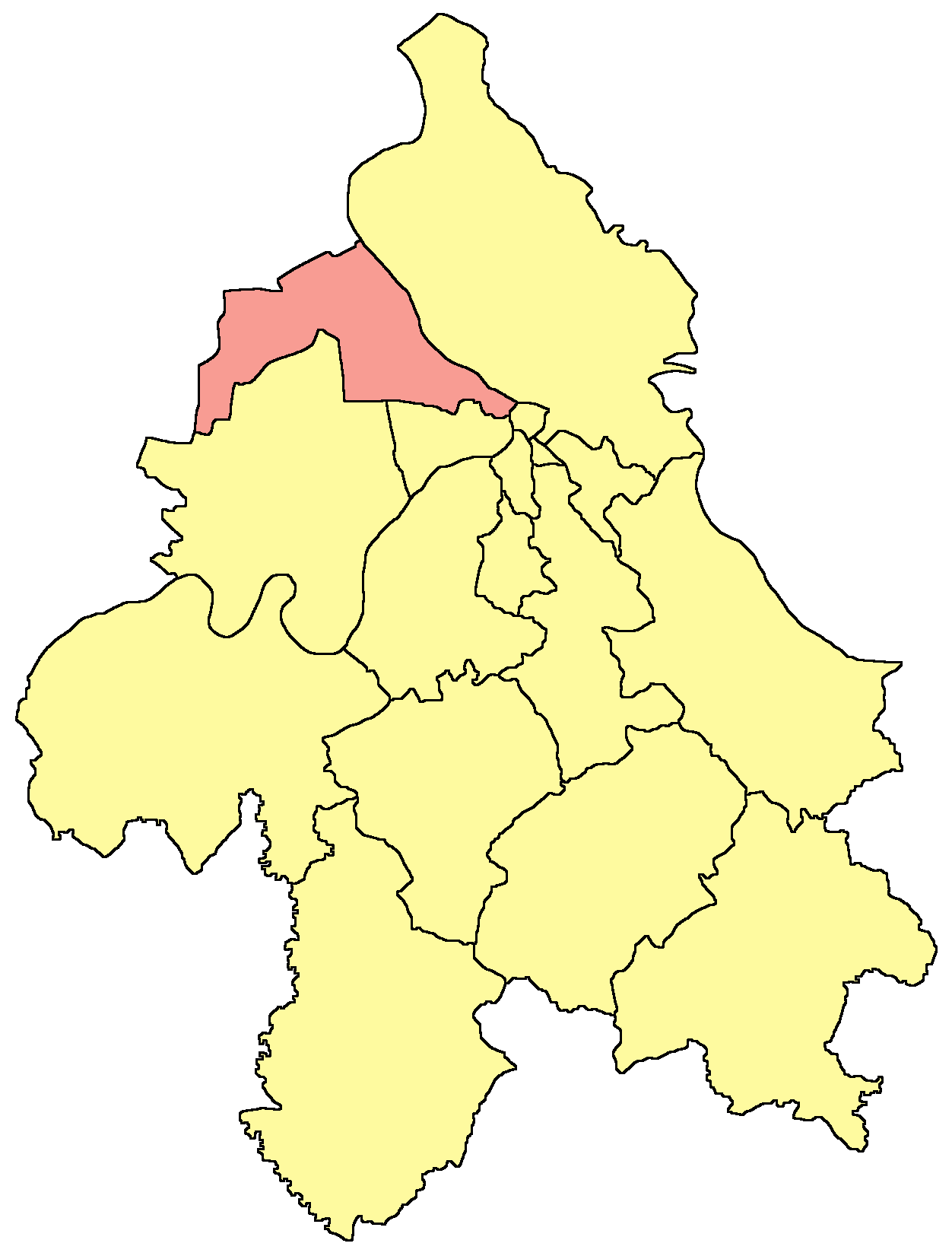 Belgrade municipality map